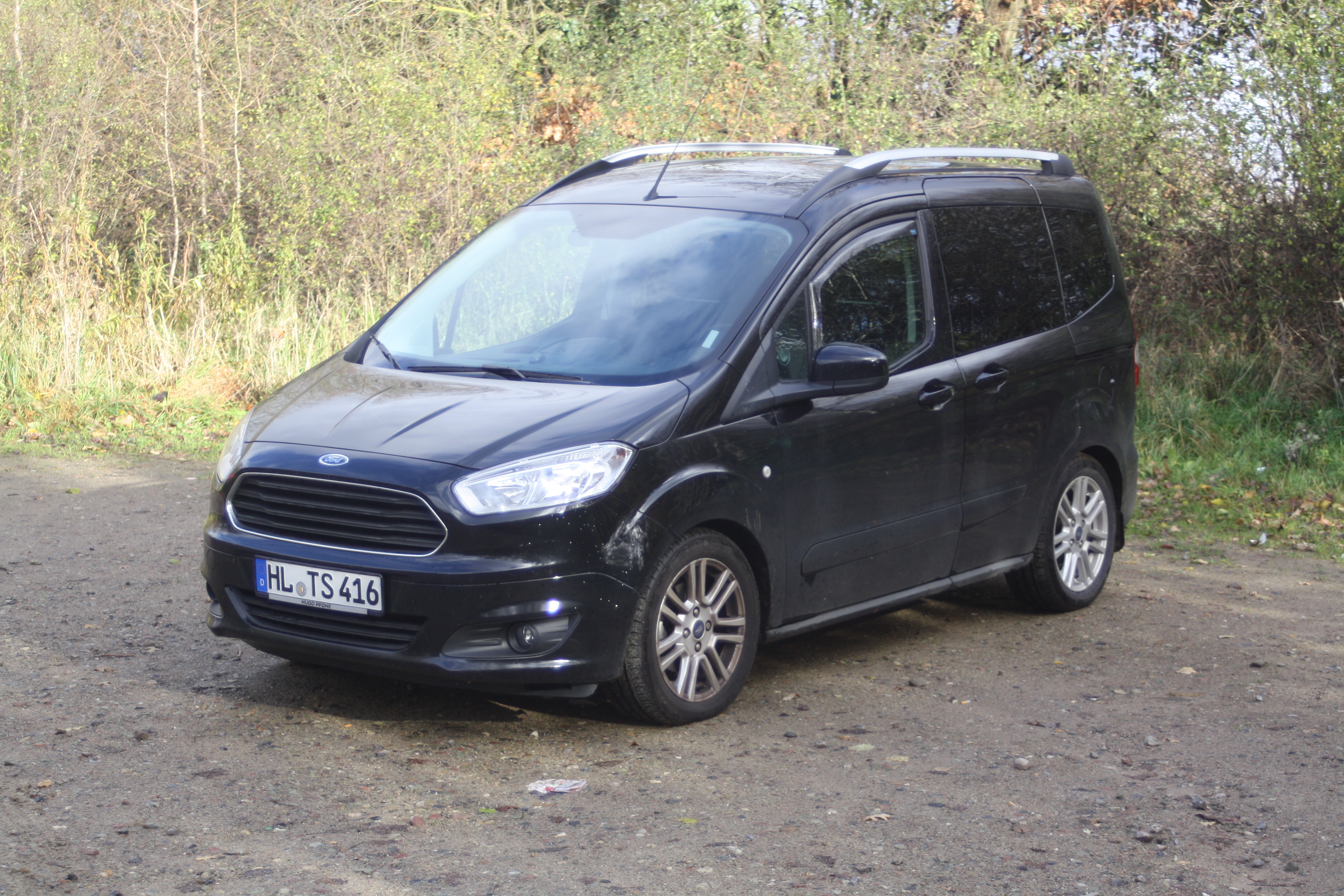 Ford Tourneo Courier Titanium Ausstattung Baujahr Ende 2016